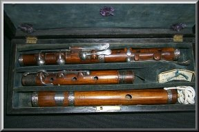 photo de la flute Drouet, collection de Jean-Pierre Eustache